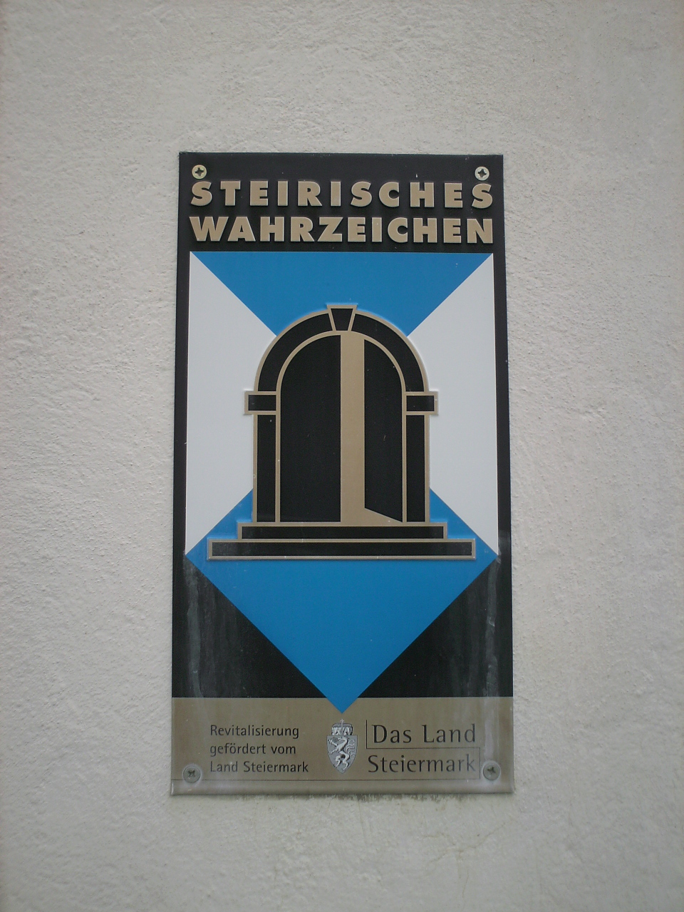 Gölkkapelle in Krieglach/Österreich, Tafel Steirisches Wahrzeichen an der Nordwand.